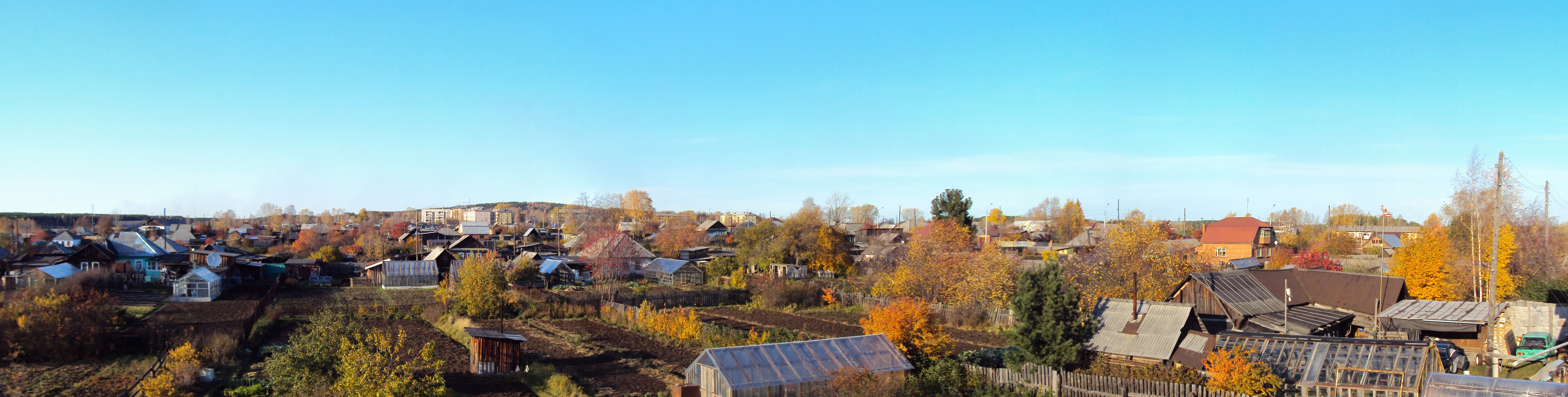 Панорама поселка Рудничный. Panorama of Rudnichny.